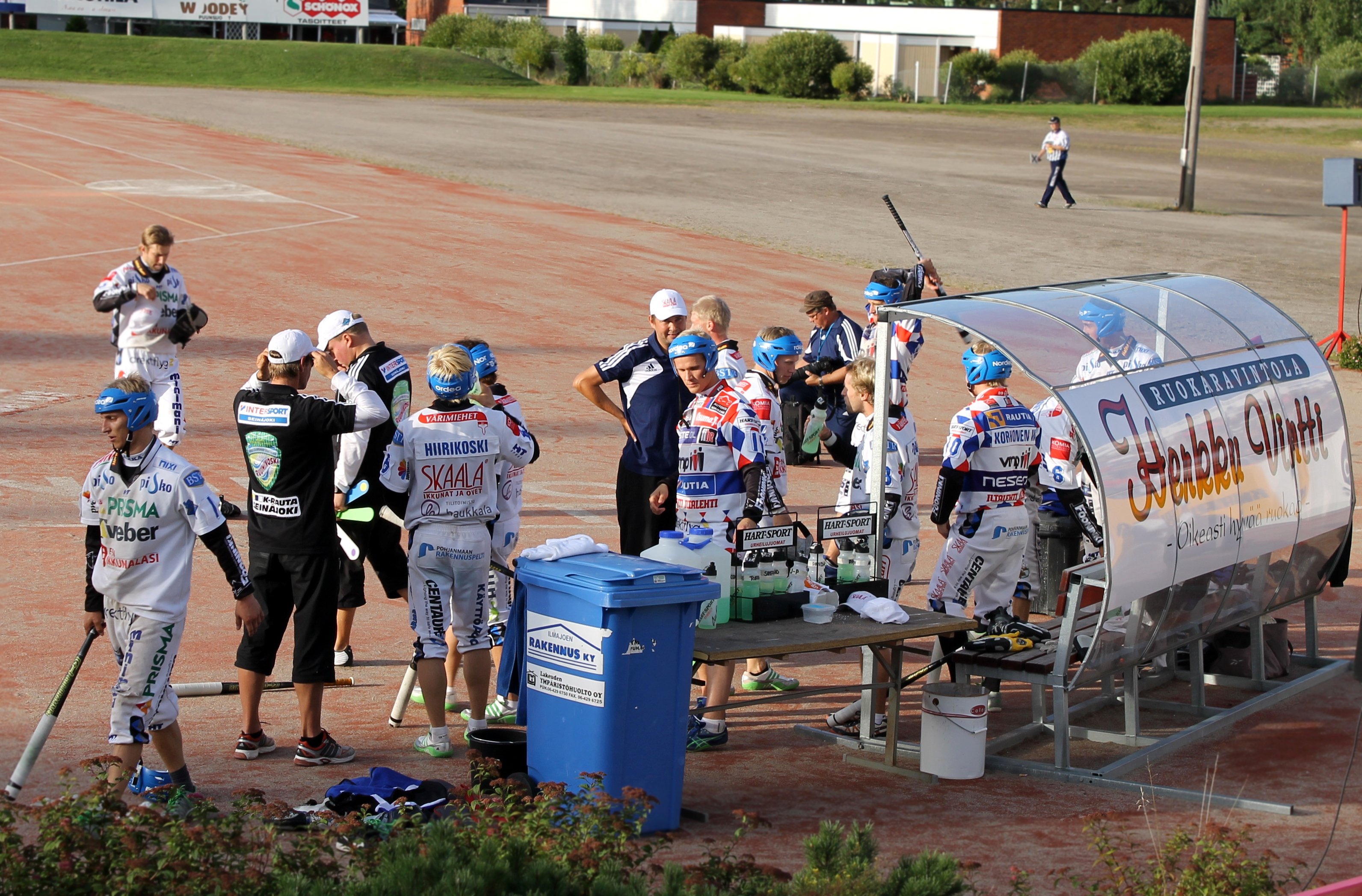 Nurmon Jymyn pelaajia vaihtopenkillä Superpesiskarsintaottelussa Seinäjokea vastaan 25. elokuuta 2012